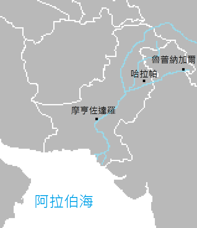 中文（台灣）: 印度河流域文明地圖